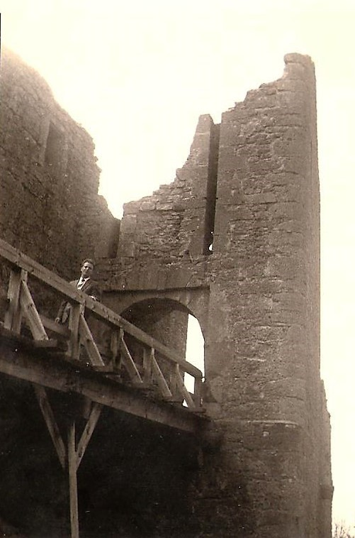 Küssaburg Zugang, ca. 1950